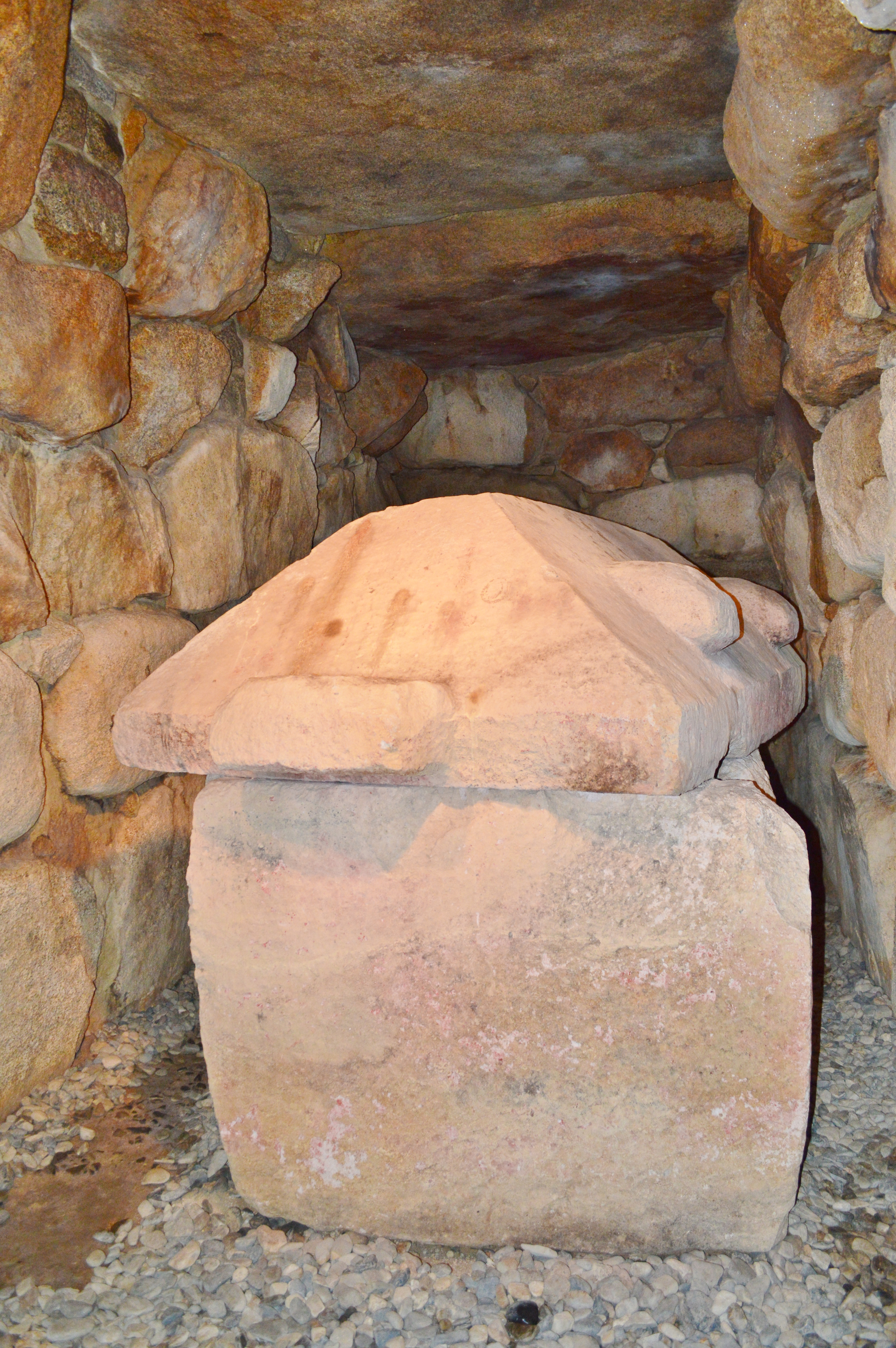 甲山古墳 (野洲市) 石室玄室 Nikon D3200